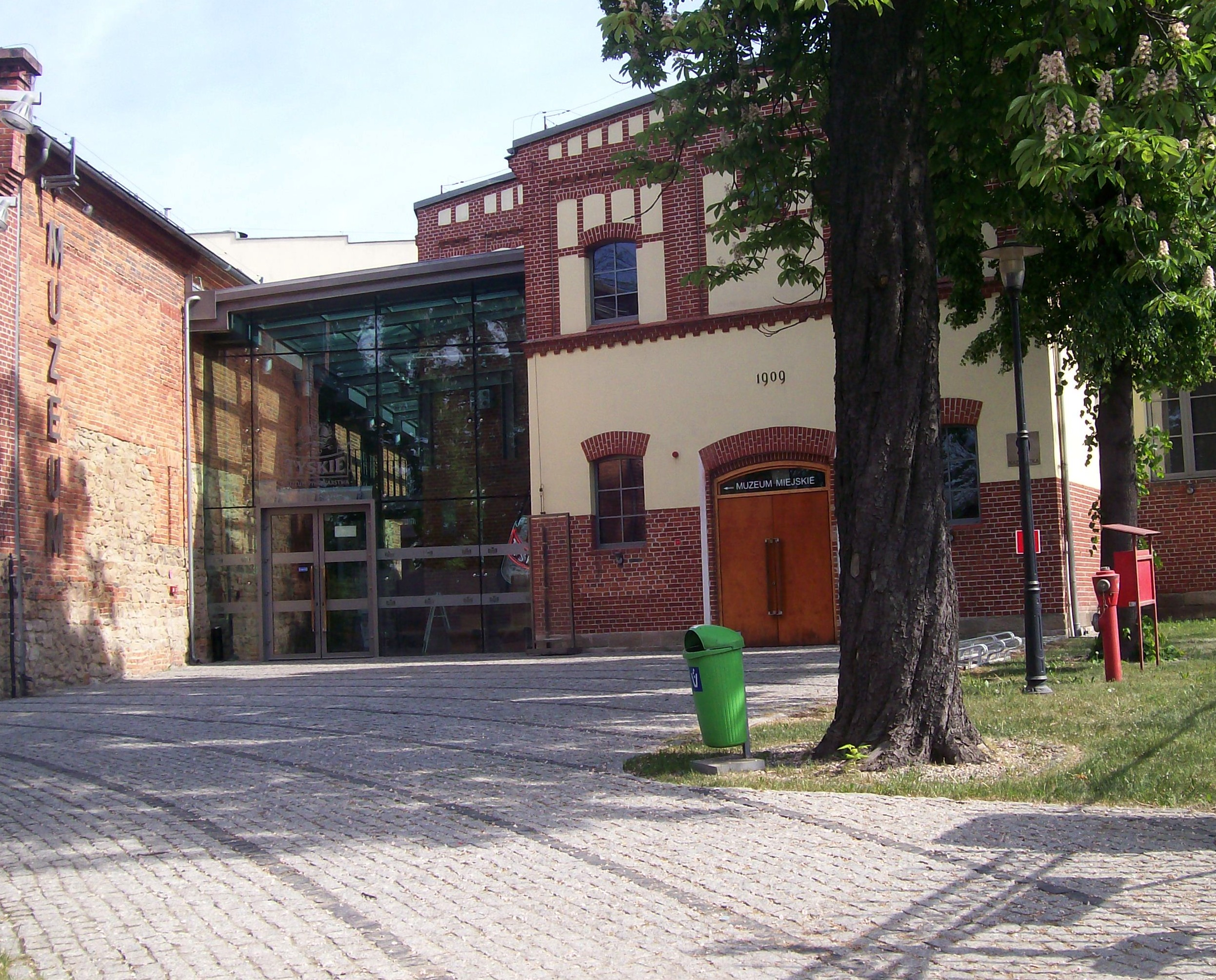 Wejście do Muzeum Piwowarstwa i Miejskiego w Tychach.